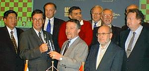 Eine Delegation des Welt-Schachverbandes FIDE besuchte Dortmund zu einer Arbeitstagung. Ihr Vorsitzender Willy Iclicki erhält vom Oberbürgermeister Dr. Gerhard Langemeyer ein Gastgeschenk.